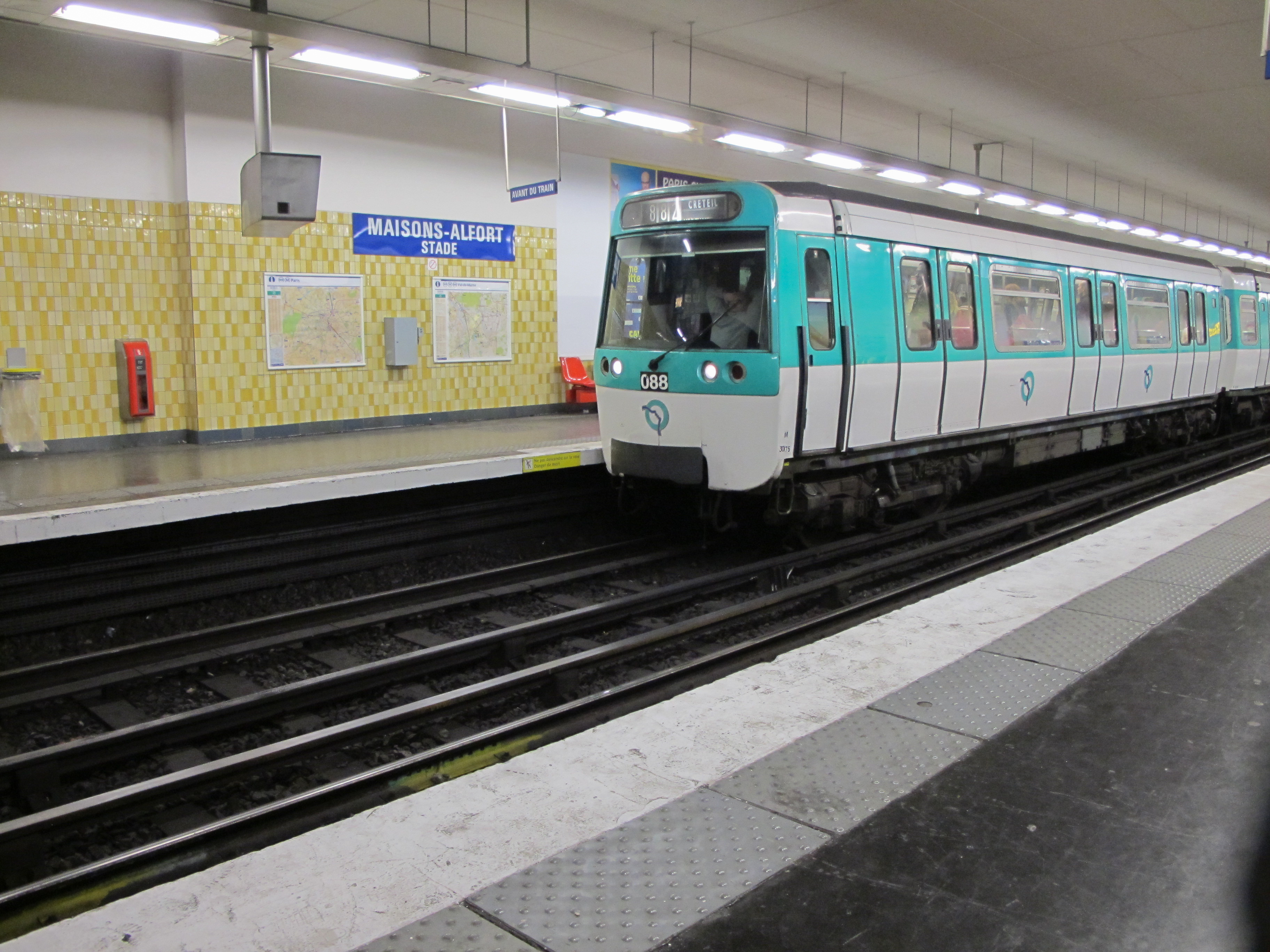 Station Maisons-Alfort - Stade. Ligne 8 du métro de Paris - Paris, France